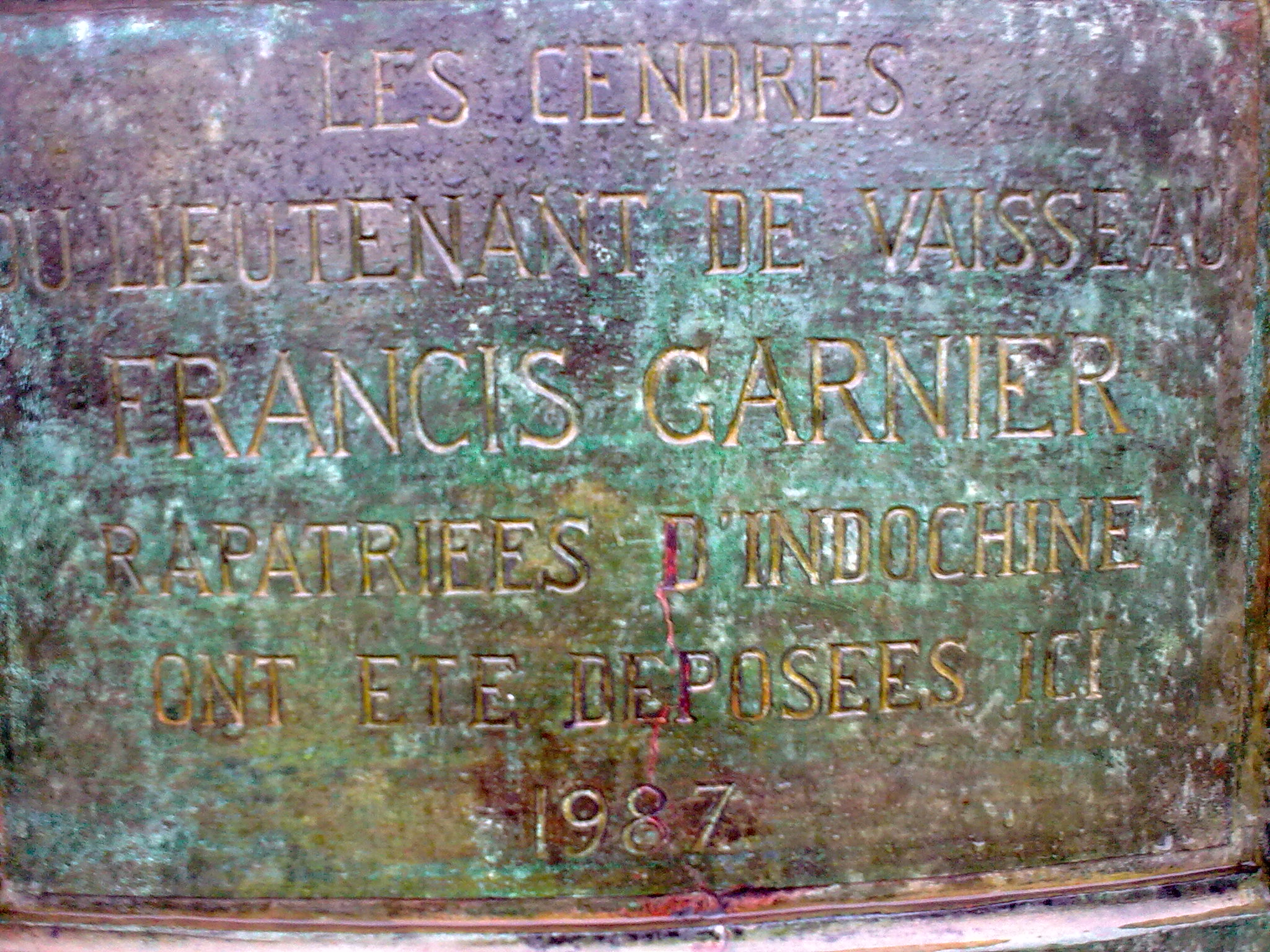 plaque commémorative sous la statue de Francis Garnier à Paris.